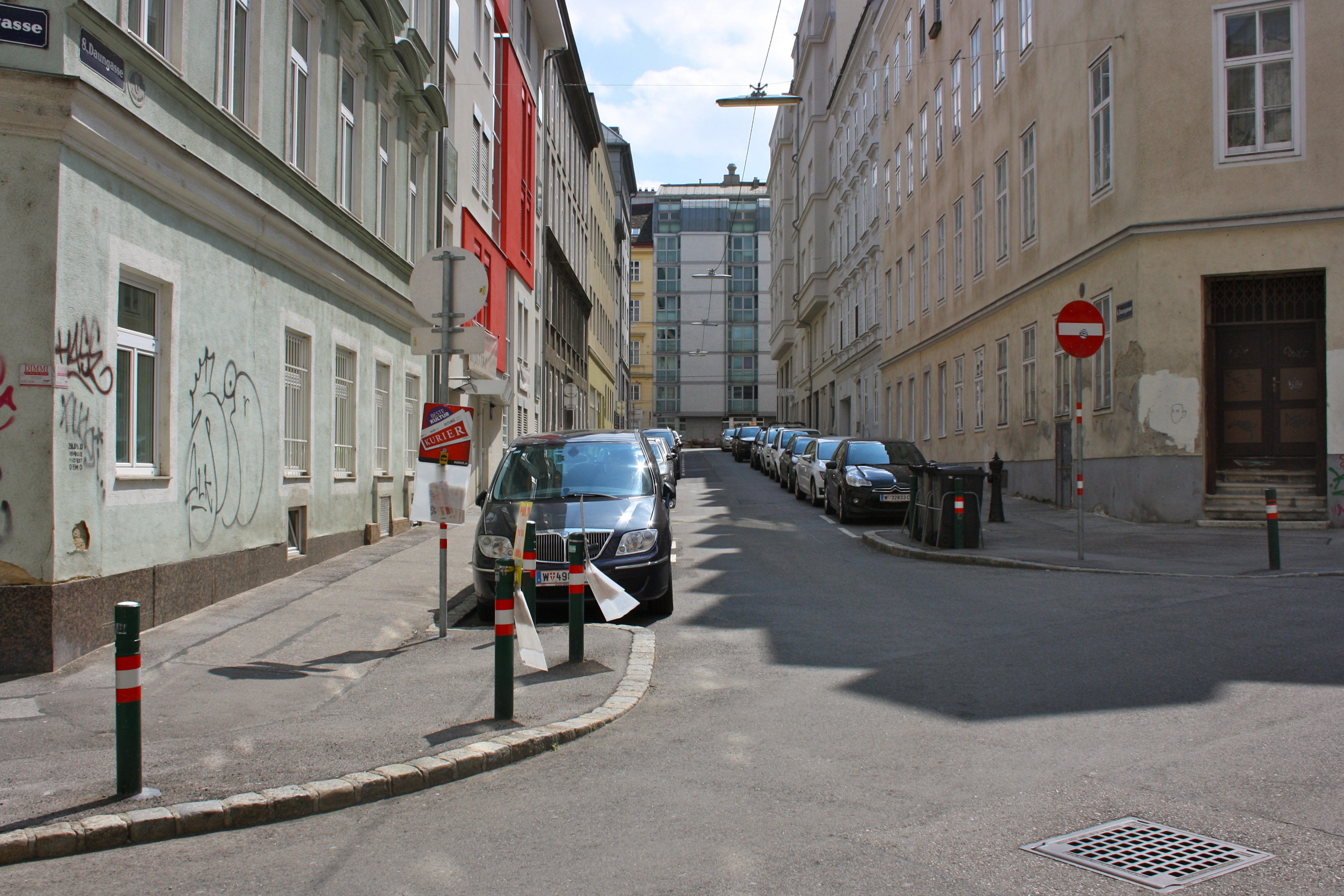 Daungasse, Wien-Josefstadt.